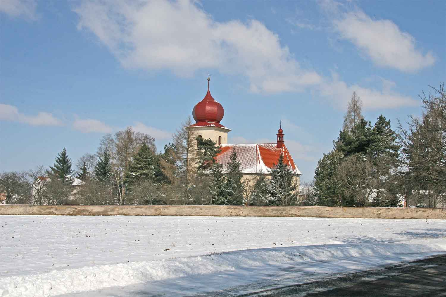 Kostel Svatého Matouše v Lipolticích